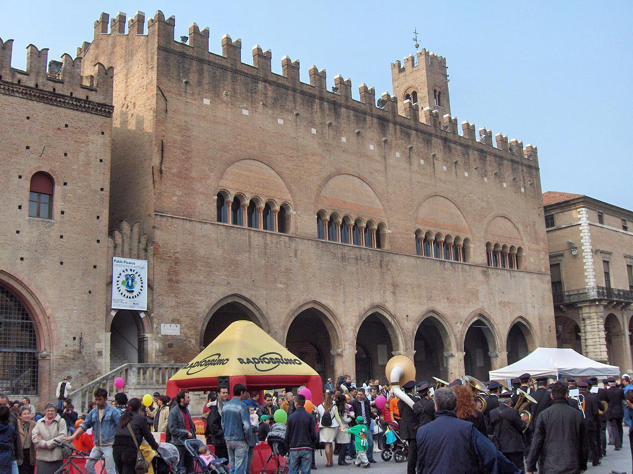 Palazzo dell'Arengo (1204-1207), Rimini, Italy